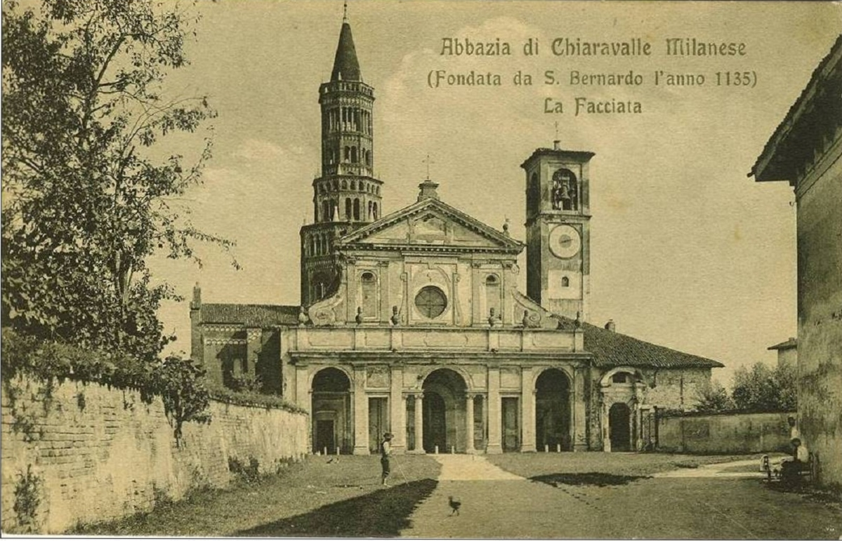 Milano, il complesso dell'Abbazia di Chiaravalle, con ancora la facciata barocca, prima dei restauri storicisti.